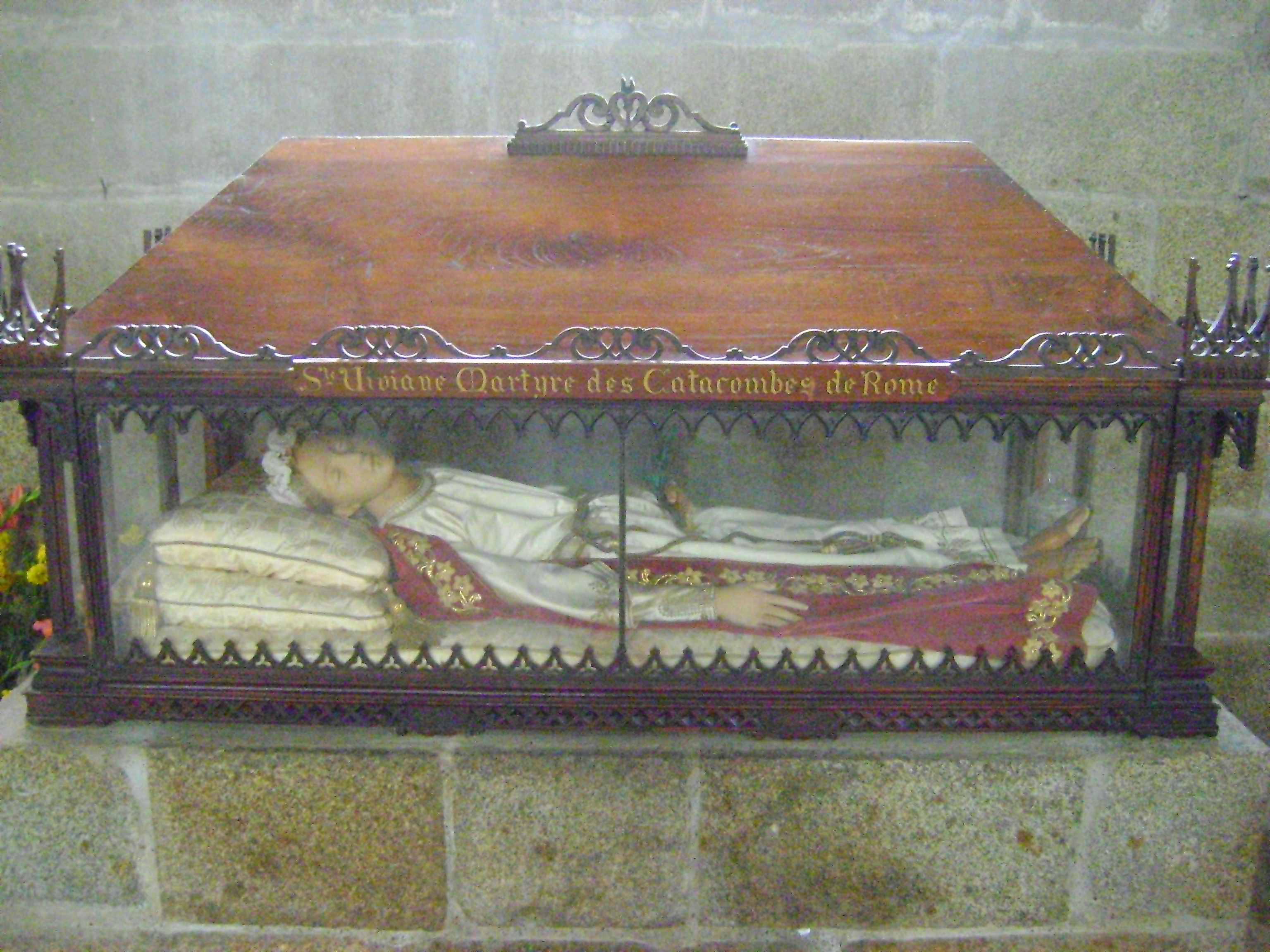 L'Eglise Saint-Sulpice de Fougères, Ille-et-Vilaine. Gisant de Sainte-Viviane.